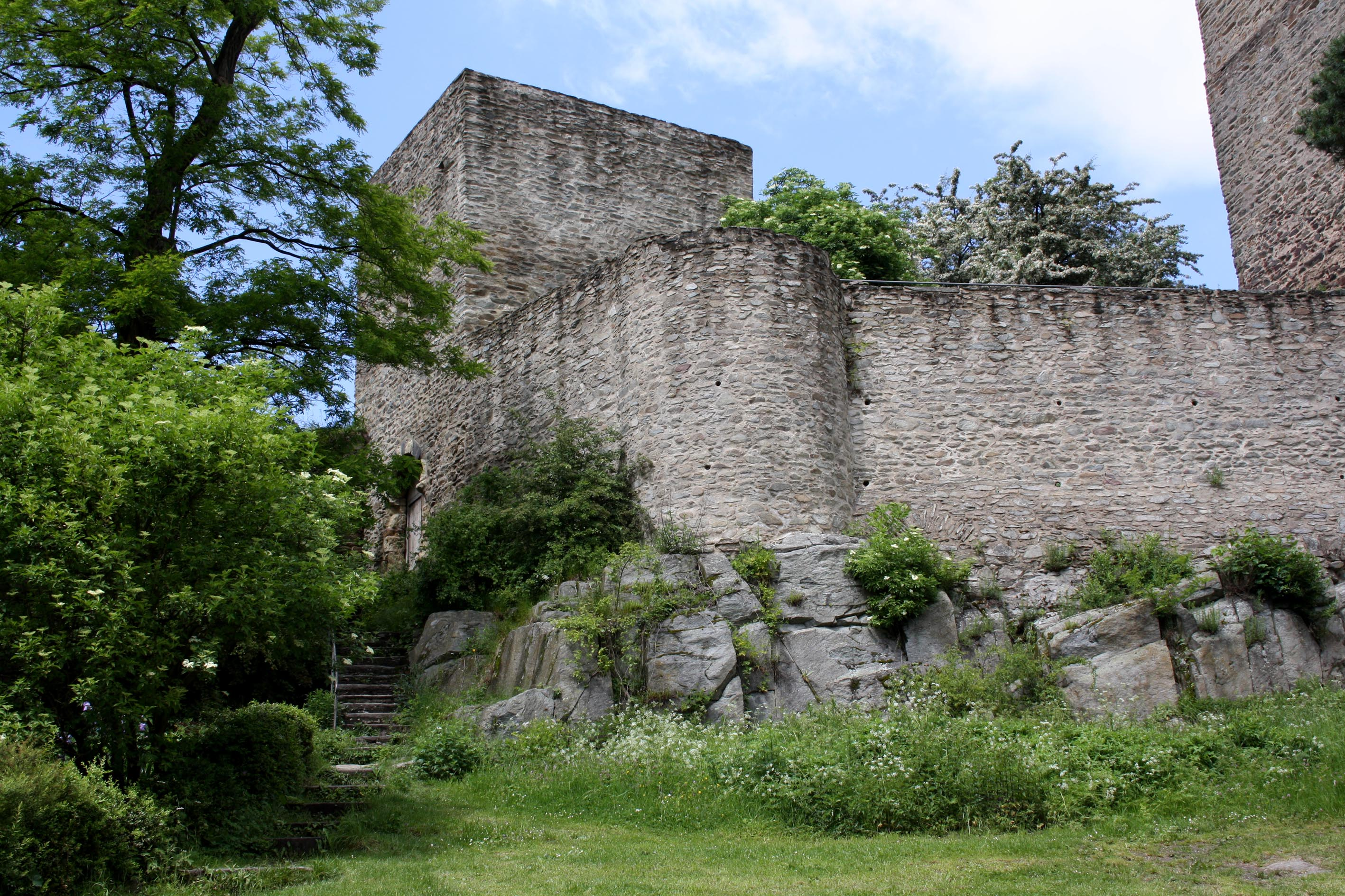 Burg Kronberg, Torturm der Oberburg